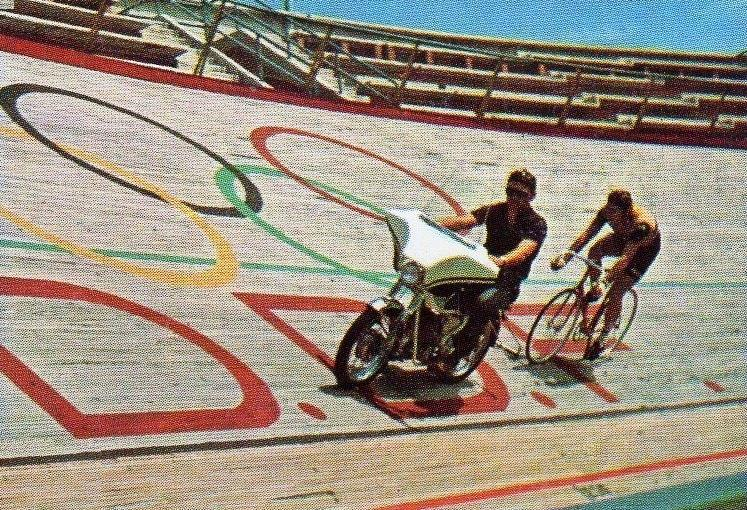 Eddy Merckx, lors de son record du monde de l'heure à Mexico (1972),'Sprint 73', Panini figurina n°199.